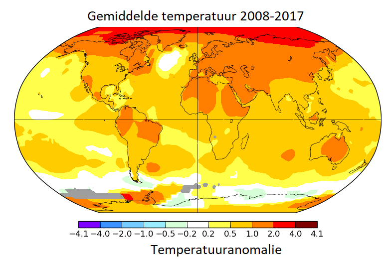 Nederlandstalige versie van File:Global_Warming_Map.jpg